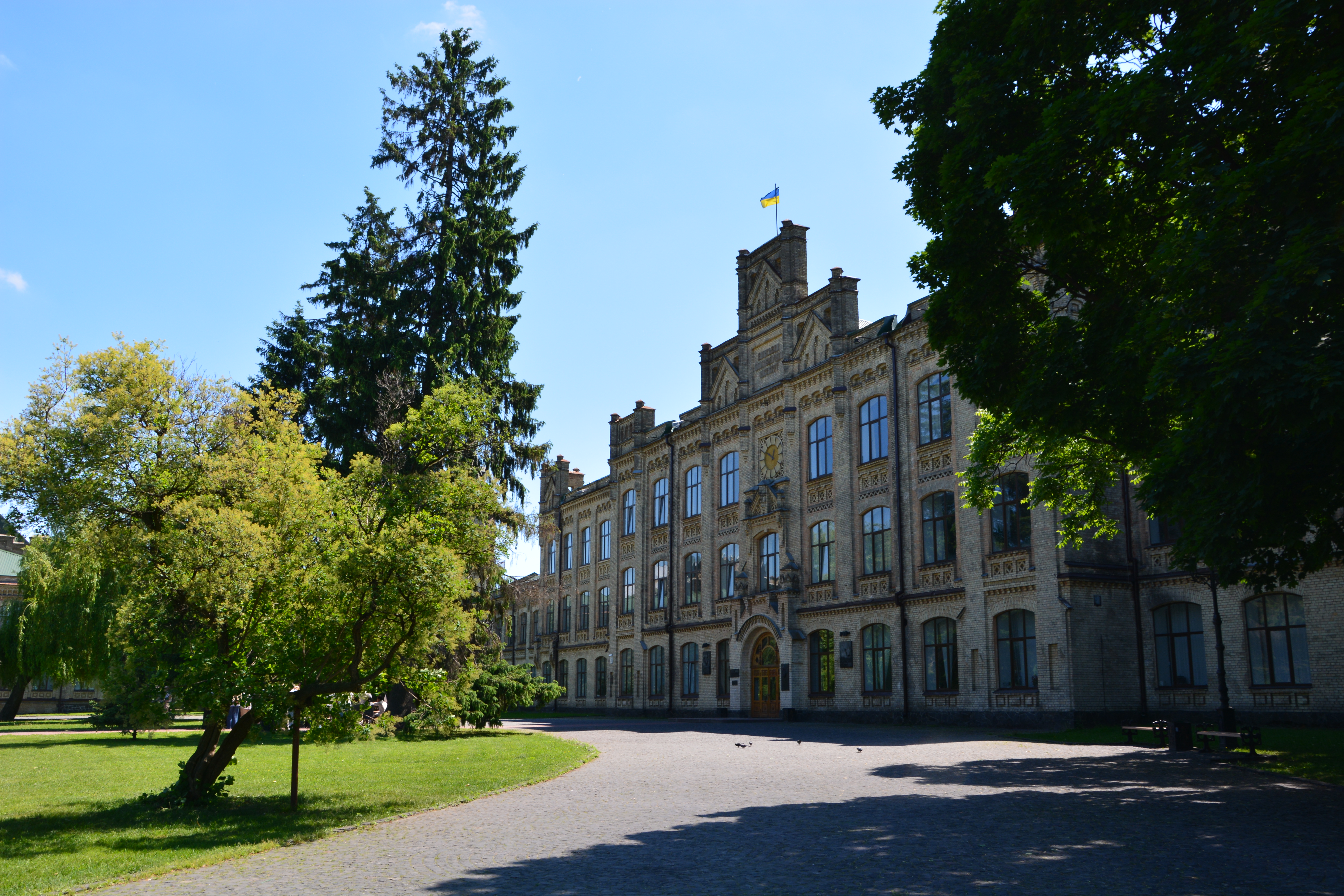 Корпус головний, де у 1905 р. відбулось 1-ше засідання Київради робочих депутатів; у 1917–1918 рр. містився штаб Червоноармійських робітничих загонів Шулявського району; у 1924–1926 рр. вчився Корольов С. П., конструктор, академік, Київ, Перемоги просп., 37